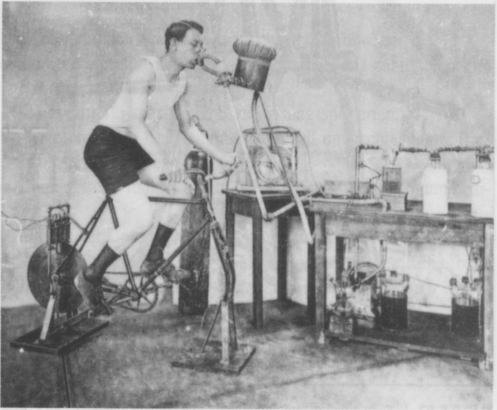 Fahrradergometrie mit Untersuchung des Gasstoffwechsels nach Atwater und Benedict um 1900 in den USA